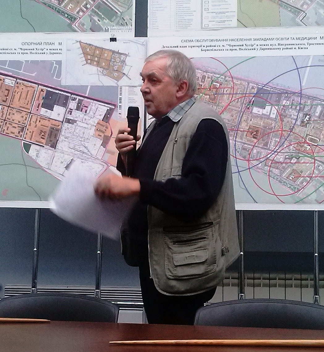 Дюжев Сергей Андреевич - украинский архитектор и общественный деятель